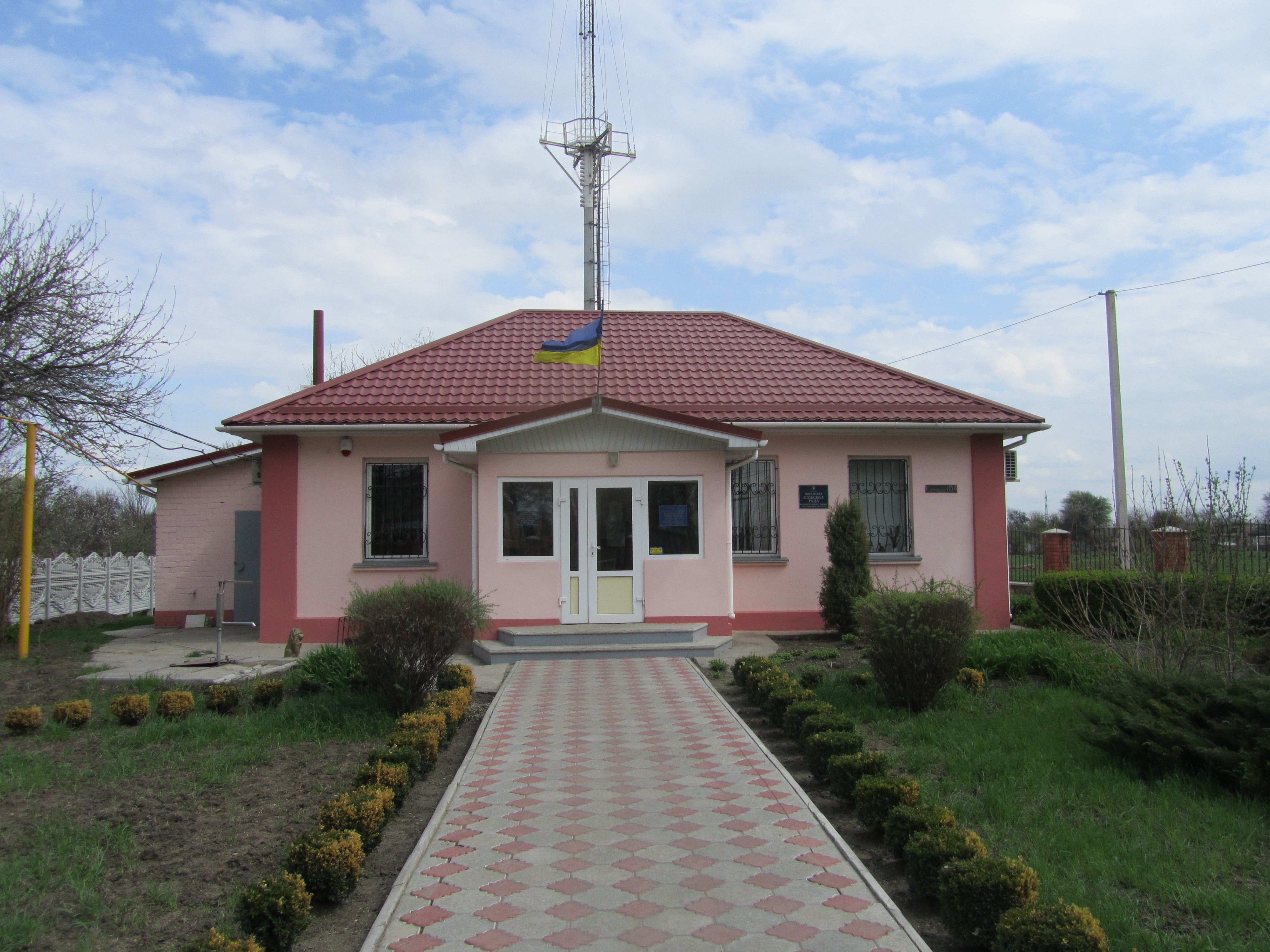 Піщанська сільська рада (Кременчуцький район)